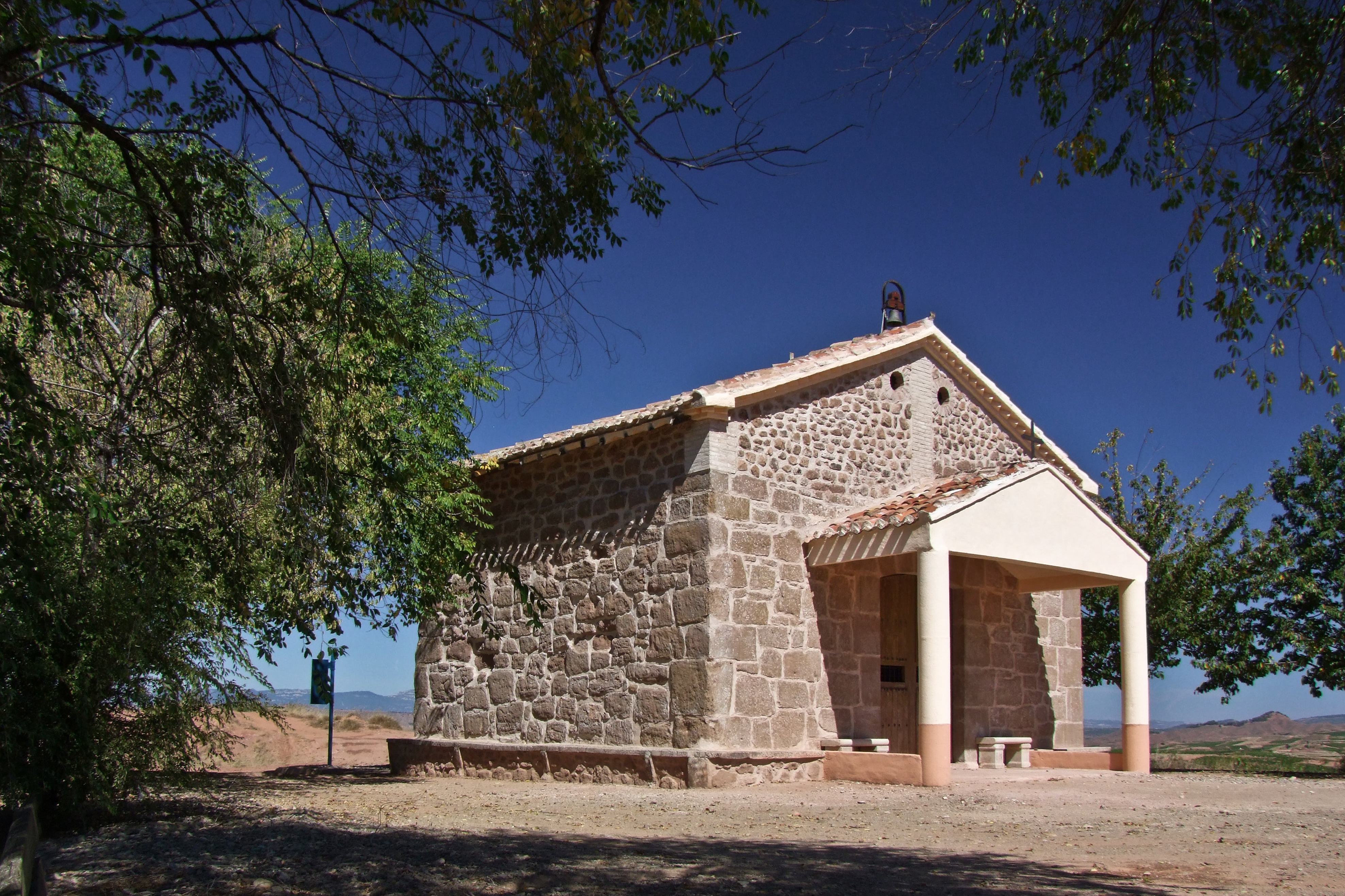 Ermita de San Cristóbal en la localidad de Cordovín, La Rioja - España